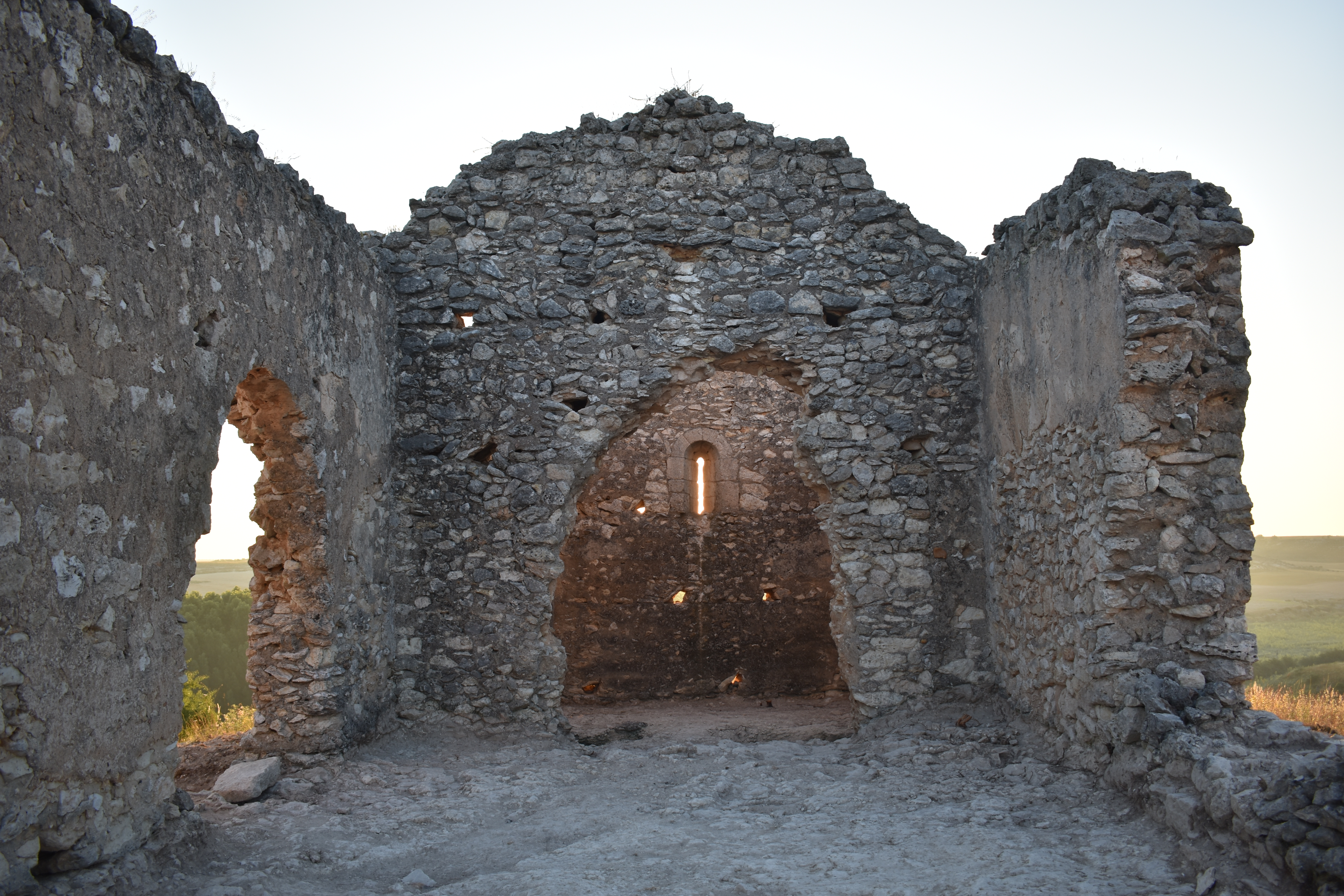 Vista interior de la Ermita de San Nicolás desde la planta central y el ábside al fondo